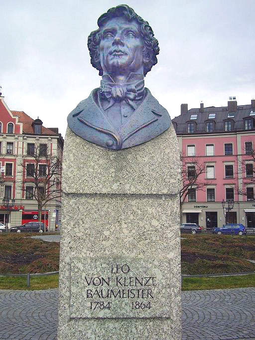 Leo von Klenze (Denkmal am Gärtnerplatz in München; Friedrich Brugger 1867; gestiftet von der Gaststätte "Deutsche Eiche" in München)